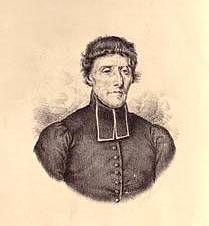 Portrait de François Jacquemont (1757-1835), prêtre janséniste du Forez